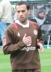 Fabio Morena, Spieler des FC St. Pauli